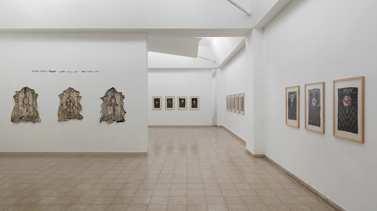 צילום של חאדר ושאח מהתערוכה "הגר" 2012 צלם: אלעד שריג